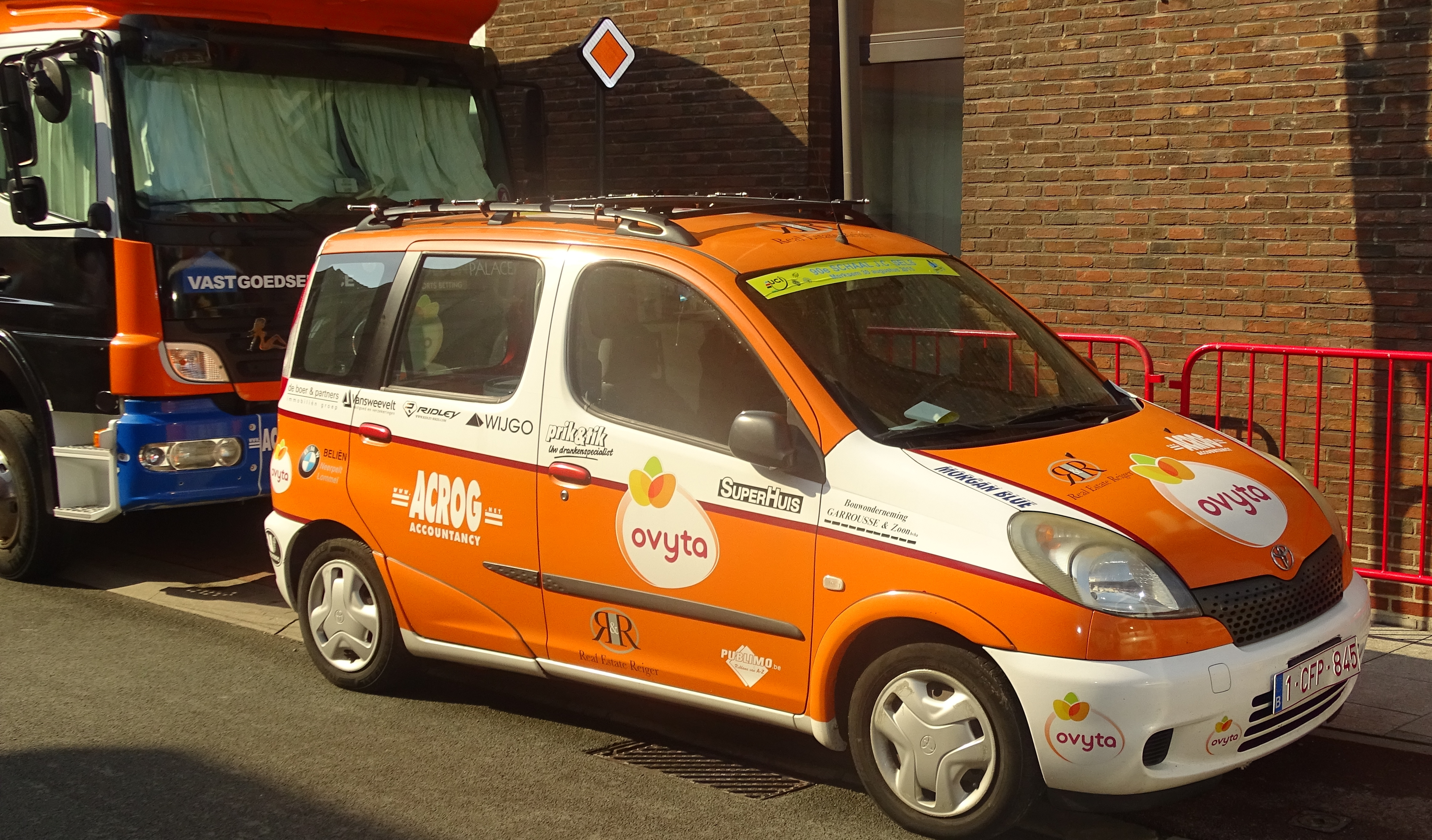 Reportage réalisé le dimanche 30 août à l'occasion du départ et de l'arrivée de la Coupe Sels 2015 à Merksem (Anvers), Belgique.